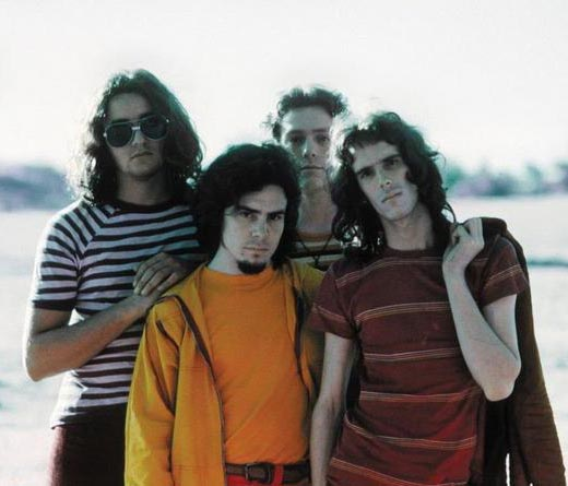 Almendra. From left to right: Luis Alberto Spinetta, Emilio Del Guercio, Rodolfo García y Edelmiro Molinari. Tapa del album Almendra II, 1970.